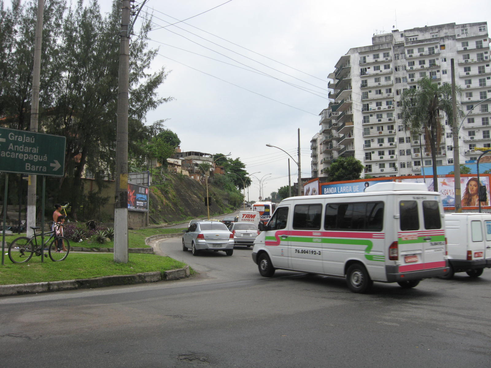 Estrada Grajaú-Jacarepaguá, localizada na zona norte da cidade do Rio de Janeiro, Brasil.